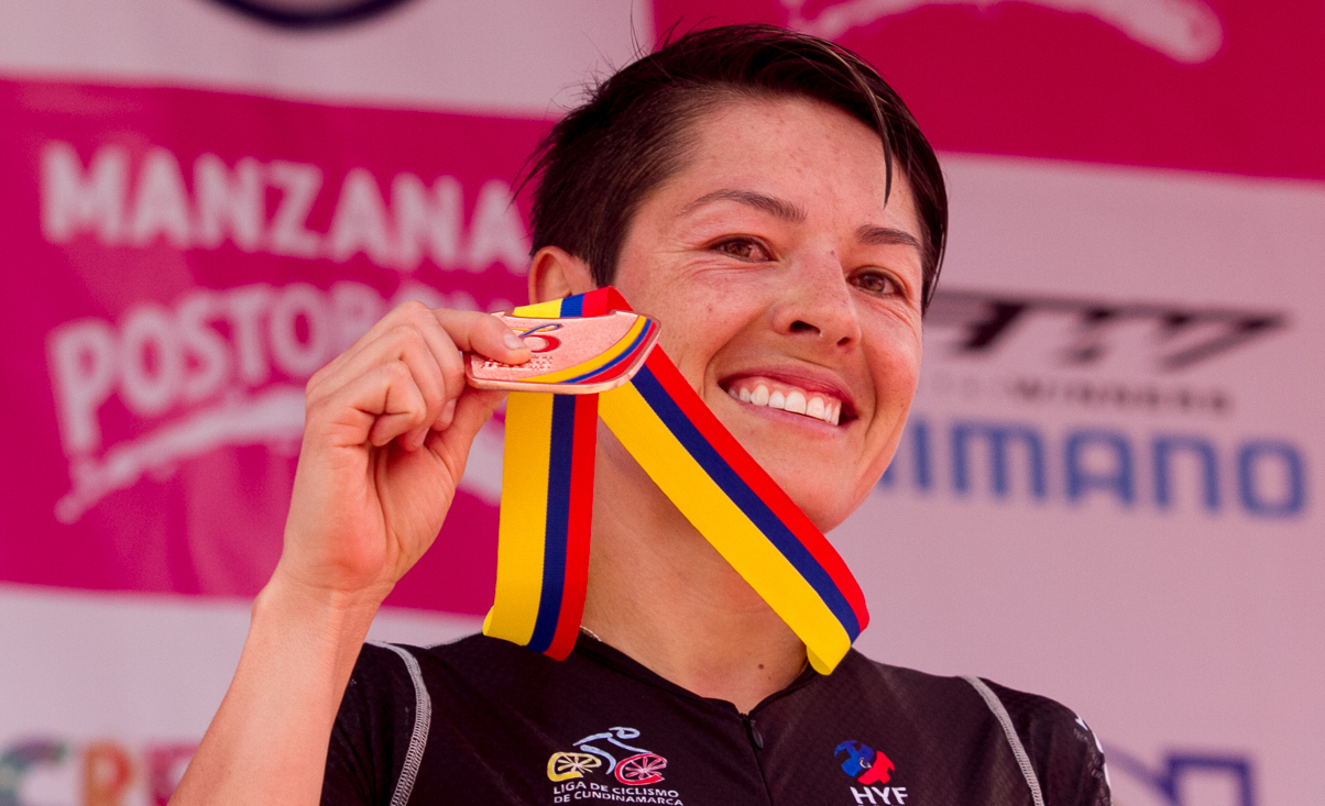 Adriana Tovar en el podio - CRI Damas Campeonatos Nacionales de Ruta Boyacá 2016